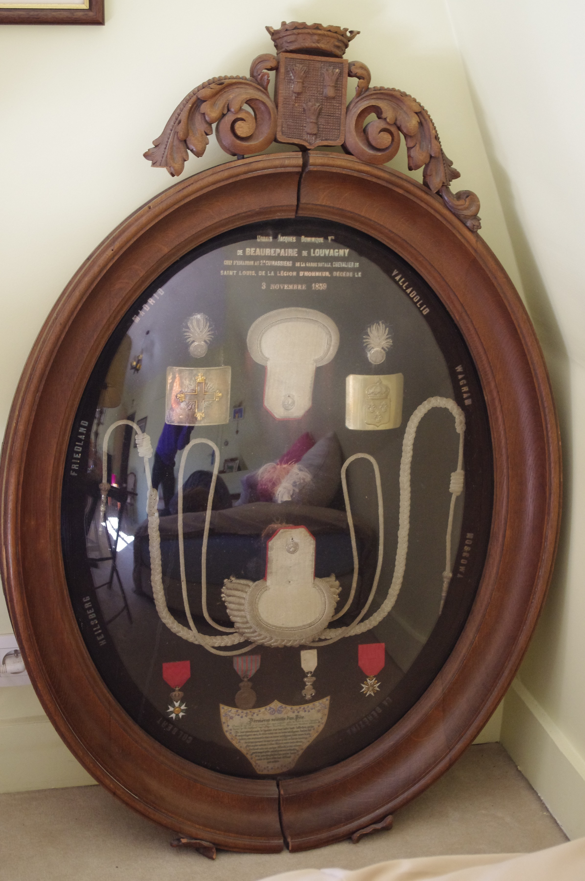 Tableau commératif d'Urbain de Beaurepaire de Louvagny - décoration et pièces d'uniforme